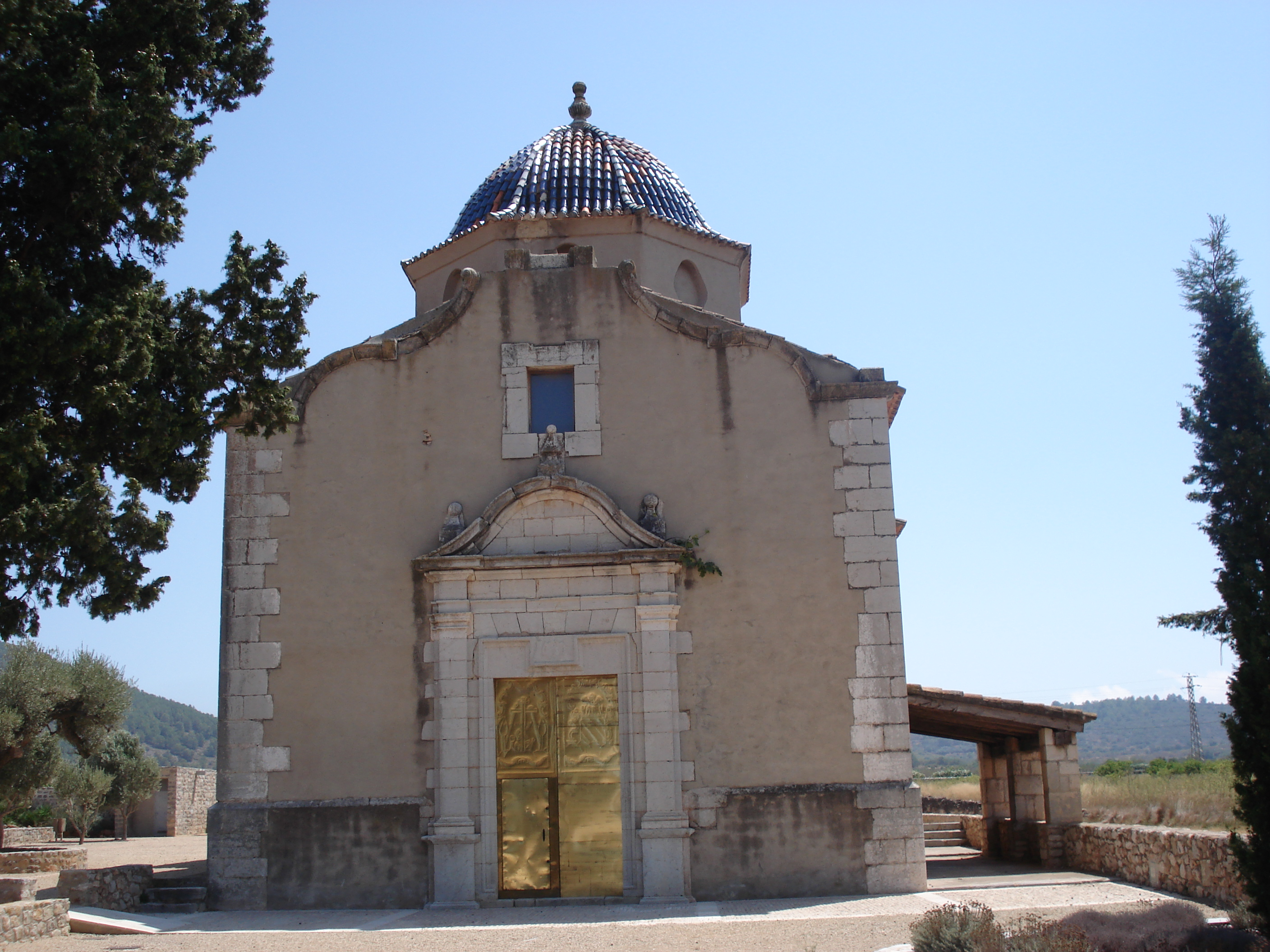 Ermita del Calvario (Alcalá de Chivert, Castellón)